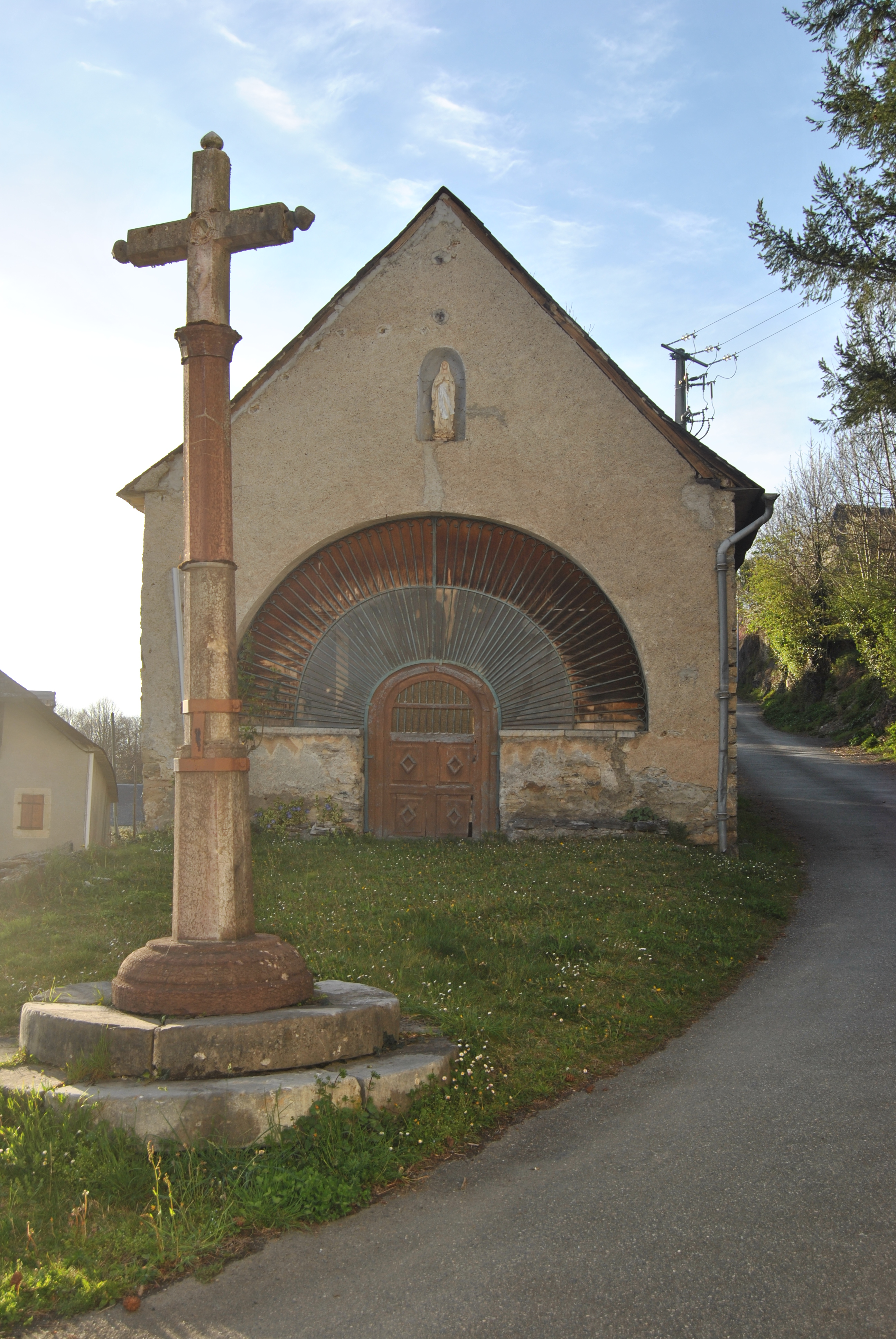 Chapelle d'Avezac-Village